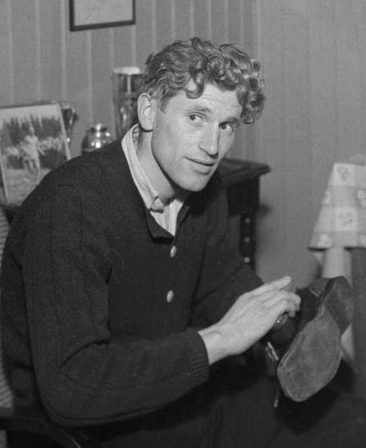 Martin Stokken i sitt hjem